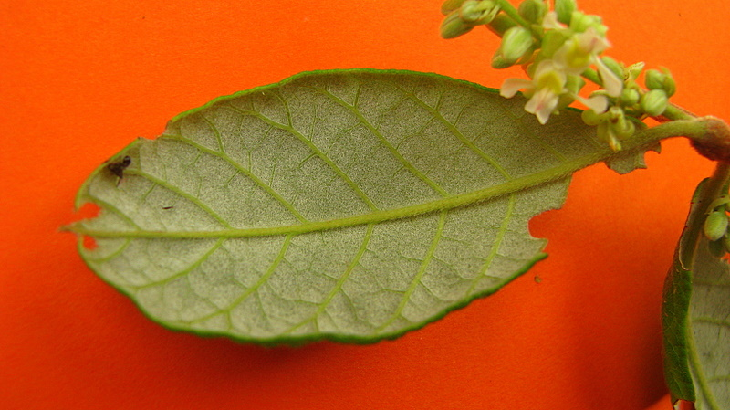 Trigonia nivea Cambess. var. pubescens (Cambess.) Lleras